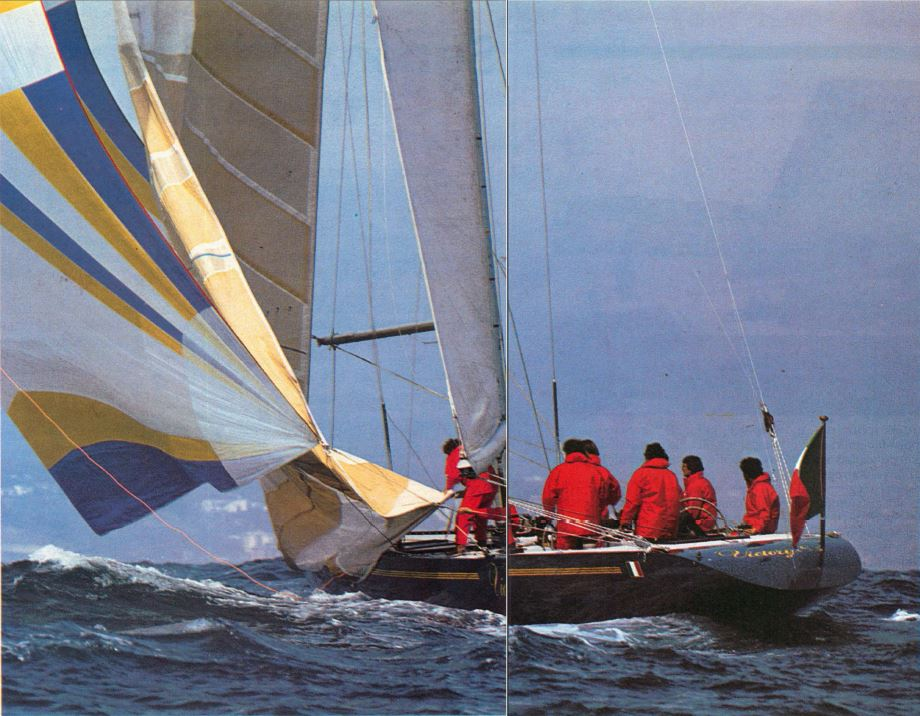 La barca a vela da regata "Victory '83" nelle acque della Liguria, quando era di proprietà del Consorzio Italia